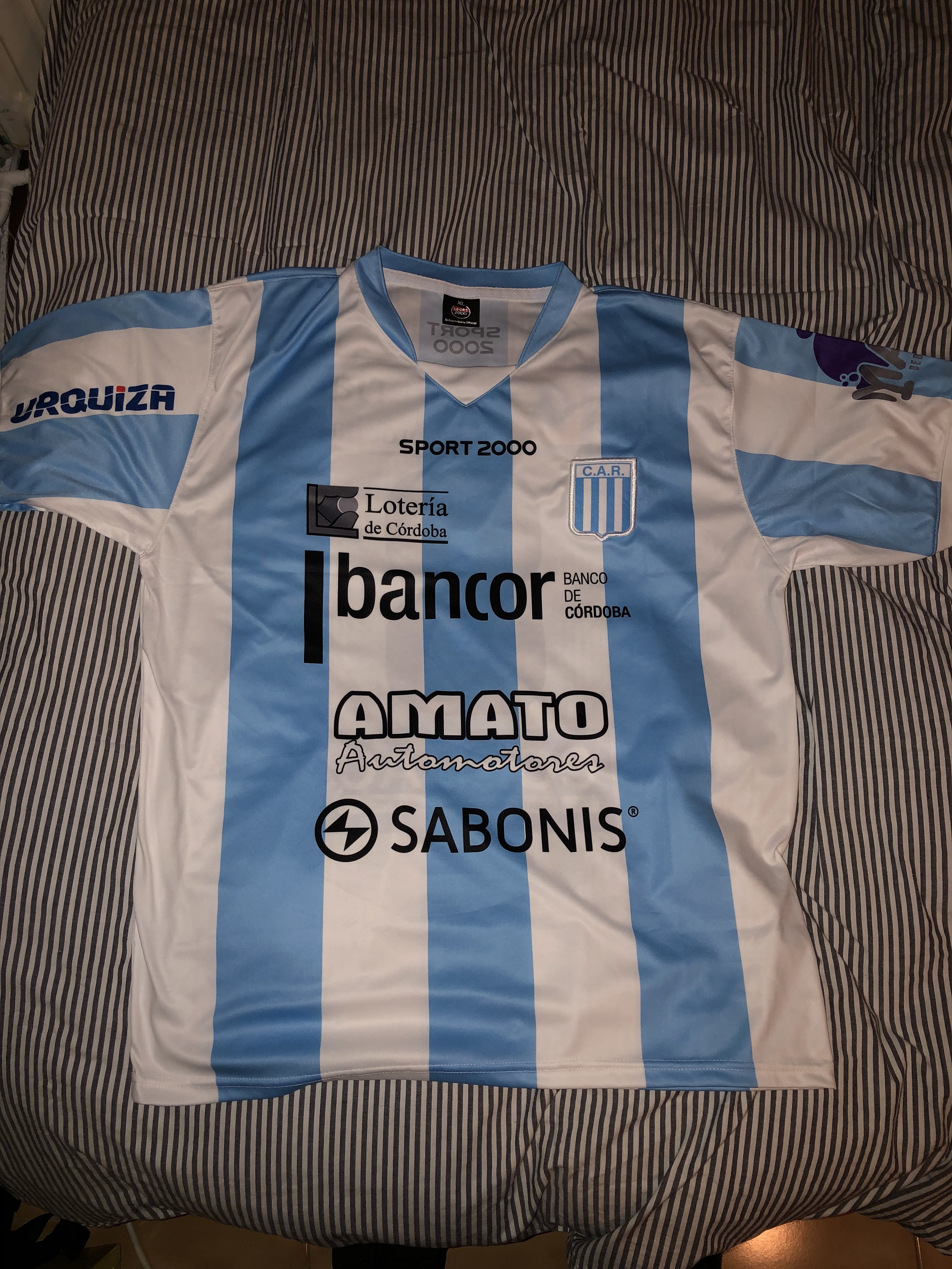 Camiseta del 2019